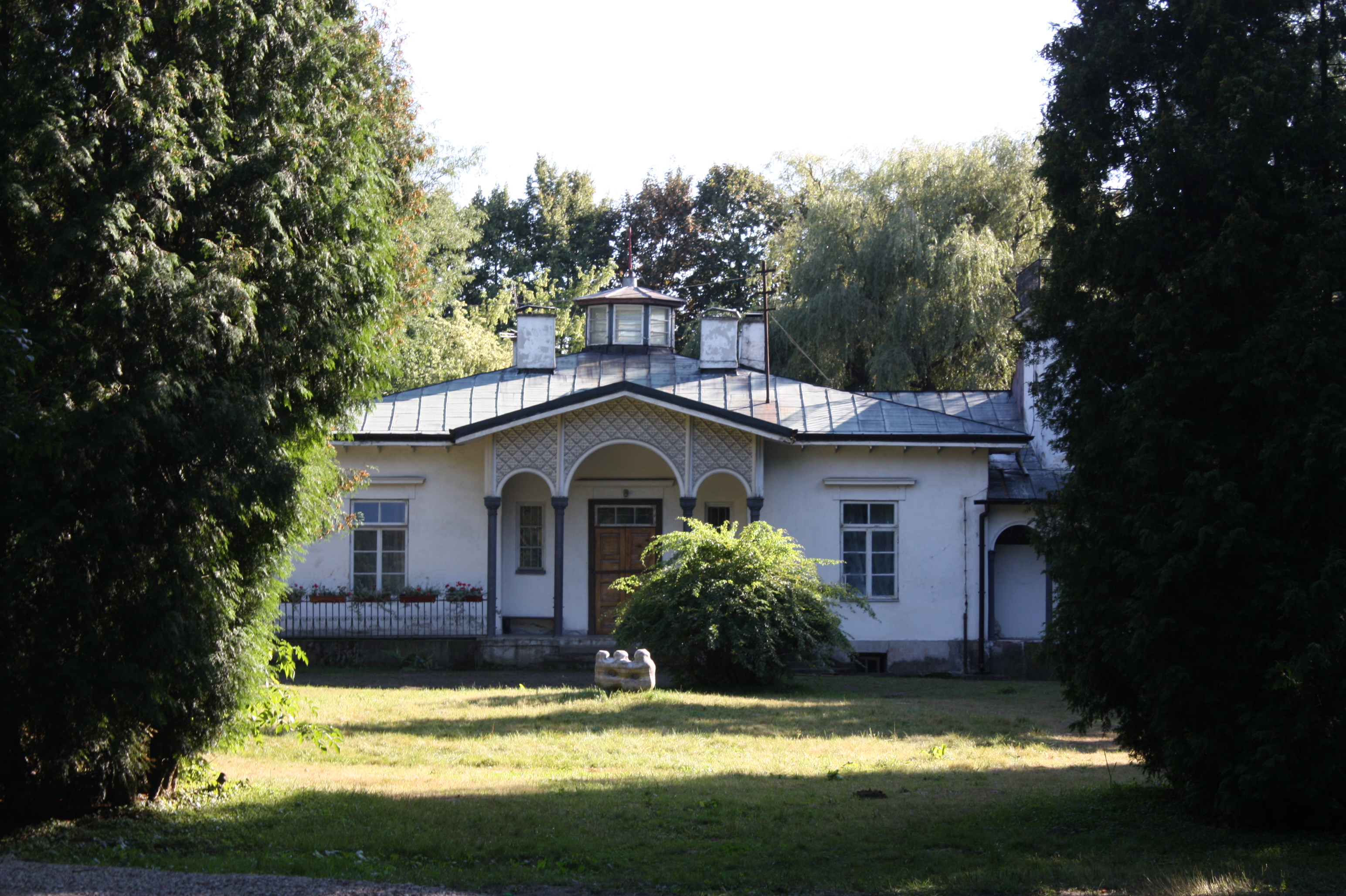 Dwór w Gołaszewie